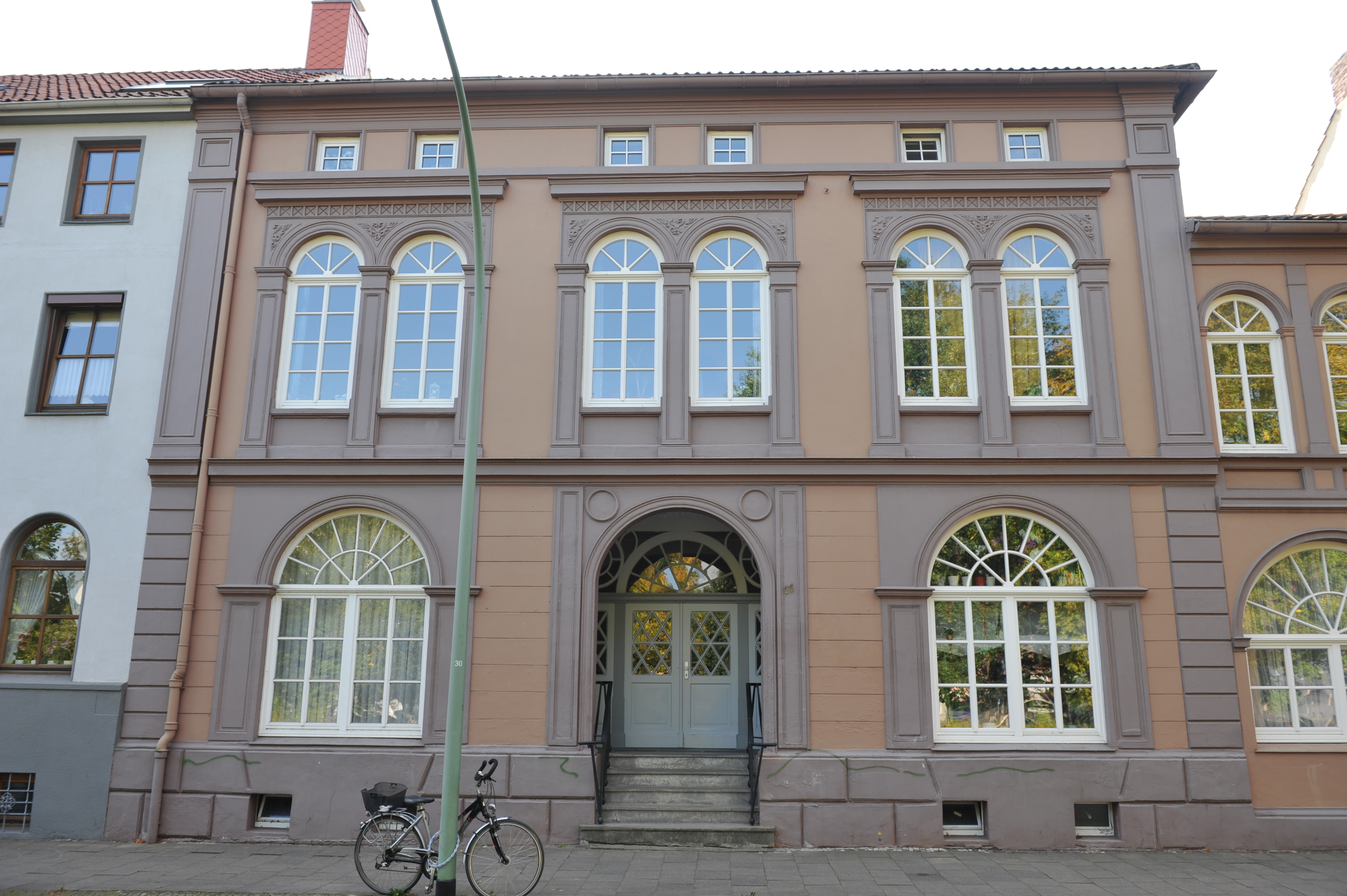 Historical building in Bremerhaven, northern Germany Stadtpalais, Berliner Platz 11, um 1884 Das abgebildete Objekt ist ein geschütztes Kulturdenkmal in der Freien Hansestadt Bremen, mit der Nr. 1632 beim Landesamt für Denkmalpflege registriert.